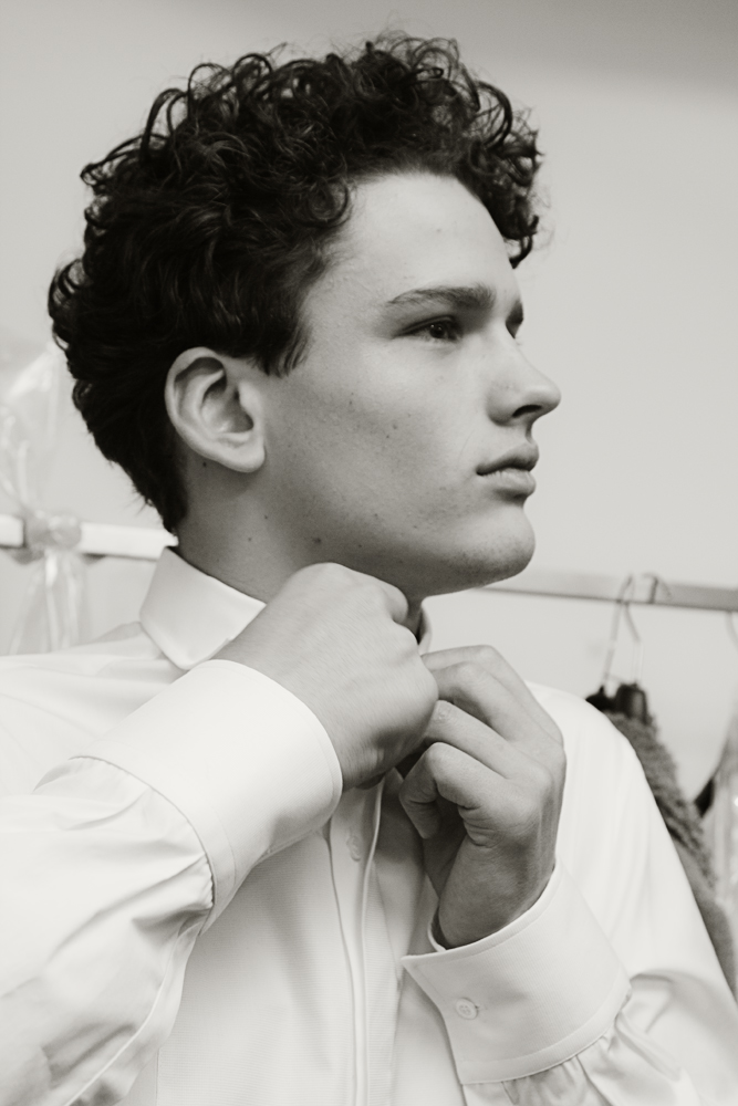 Simon Nessman @Pignatelli